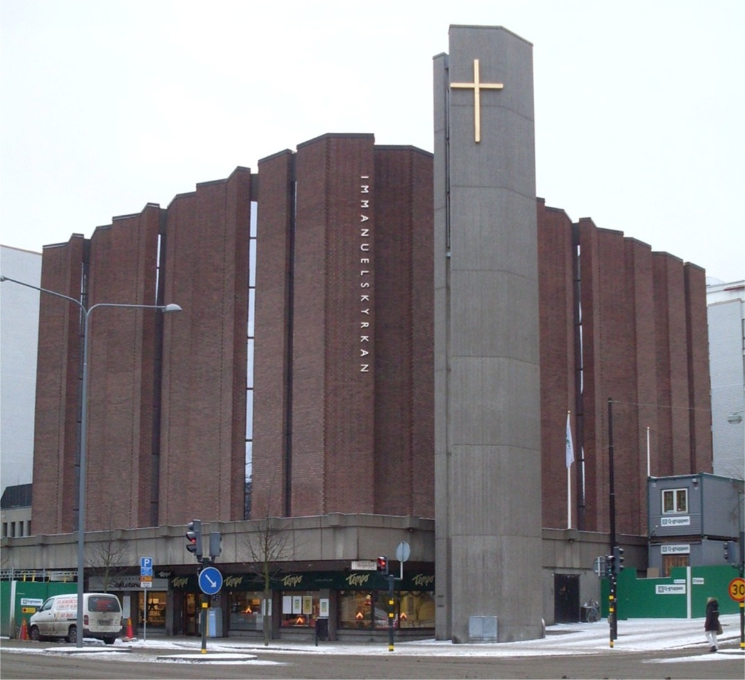 Immanuelskyrkan, Stockholm